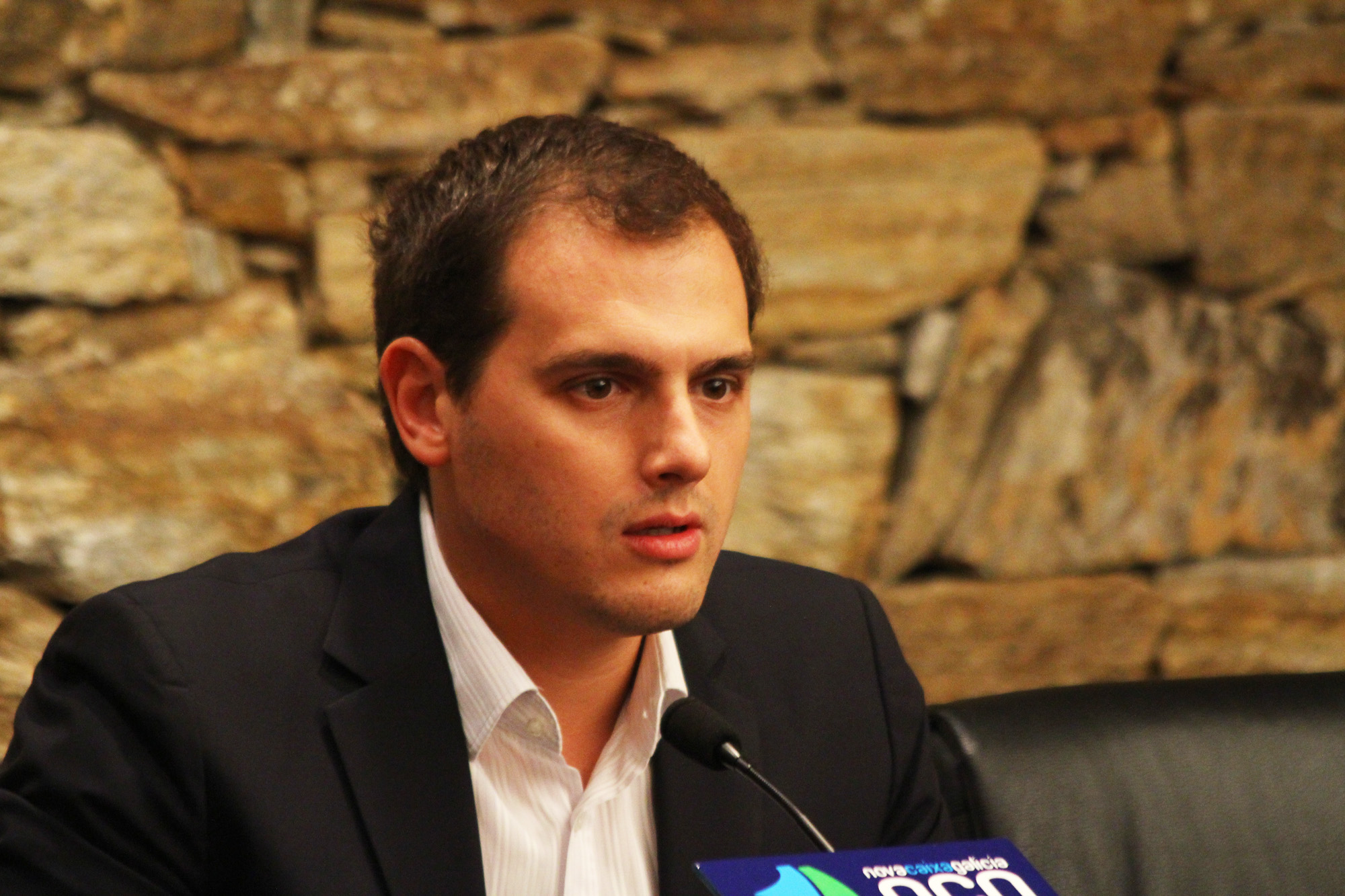 Conferencia de Albert Rivera, diputado de Ciutadans en el Parlamento catalán, organizada por Vigueses por la Libertad el 2 de octubre de 2012 en el Centro Social Novacaixagalicia de Vigo.